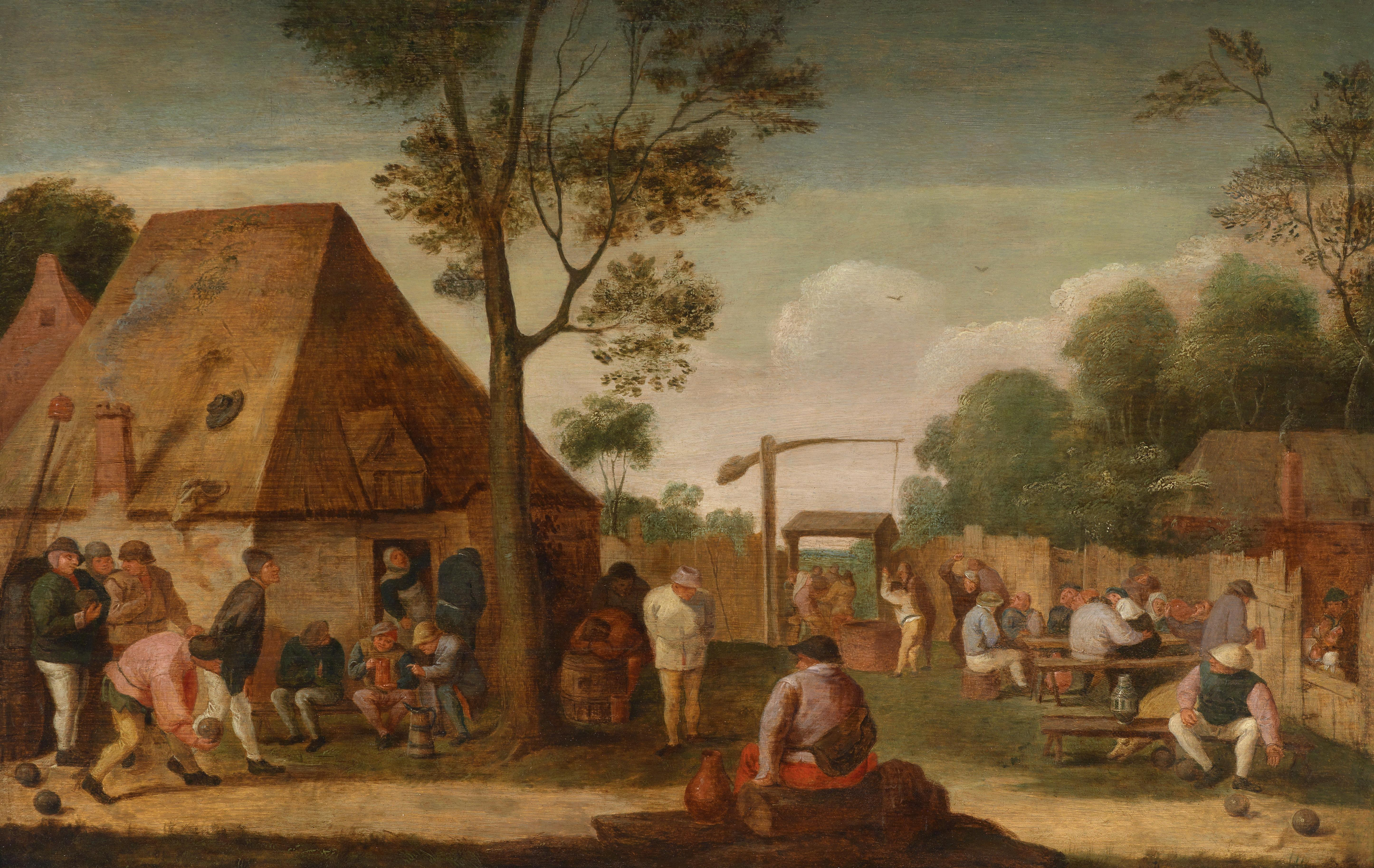 Ländliche Vergnügungen im Freien